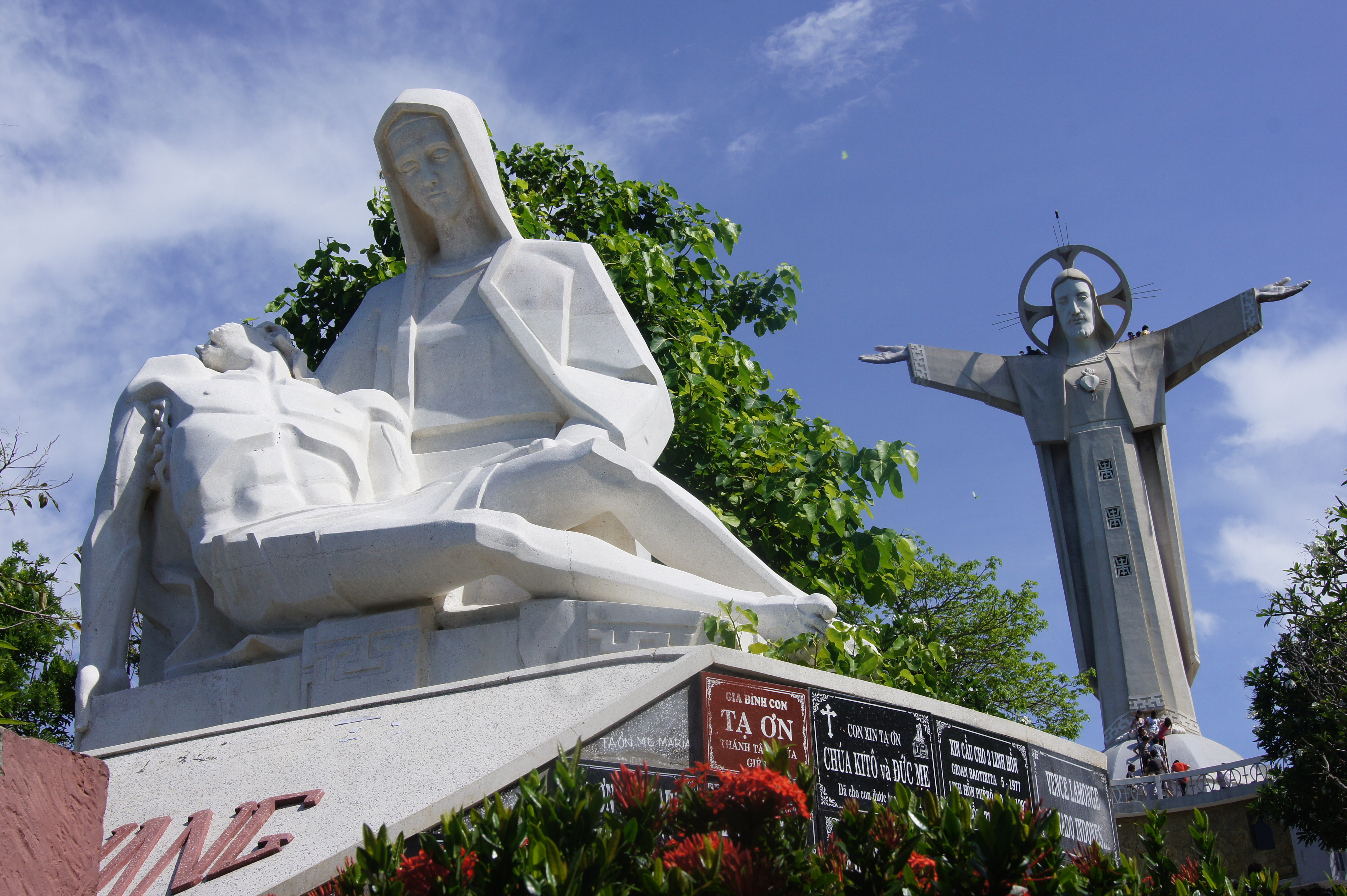 Tượng Đức Mẹ Sầu Bi trên núi Tao Phùng, Vũng Tàu. Phía trên là tượng Chúa Ki-tô vua.